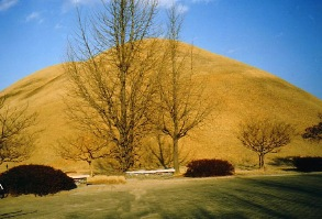 Seongdeak Gräber, Silla, Südkorea